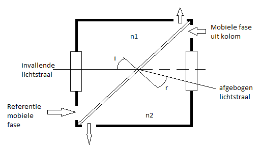 Overzicht van een flow cel in een RI detector